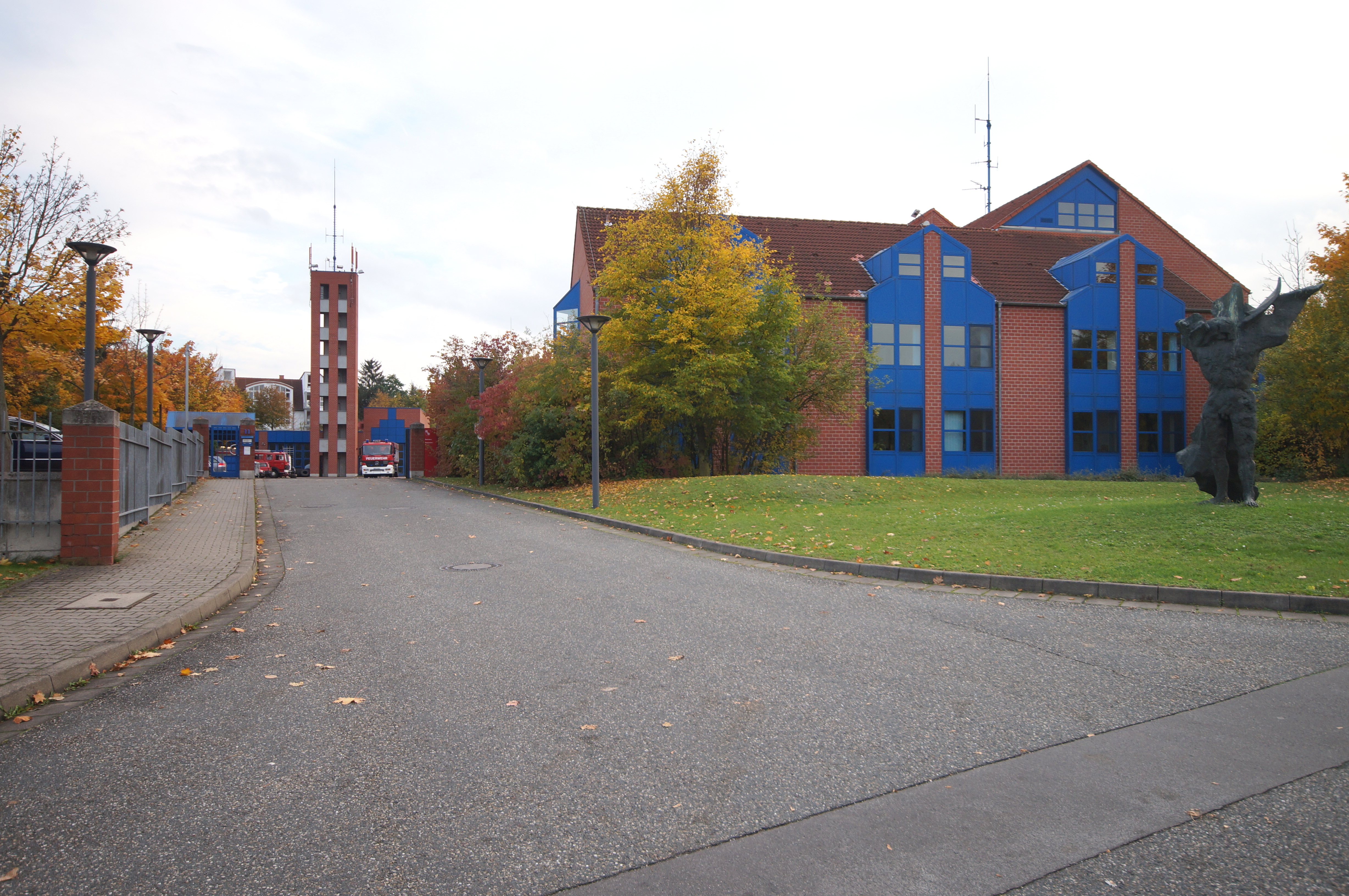 Die Haupteinfahrt des Sitzes und der Feuerwache 1 der Berufsfeuerwehr Mainz in der Jakob-Leischner-Straße 11 in Mainz-Bretzenheim.